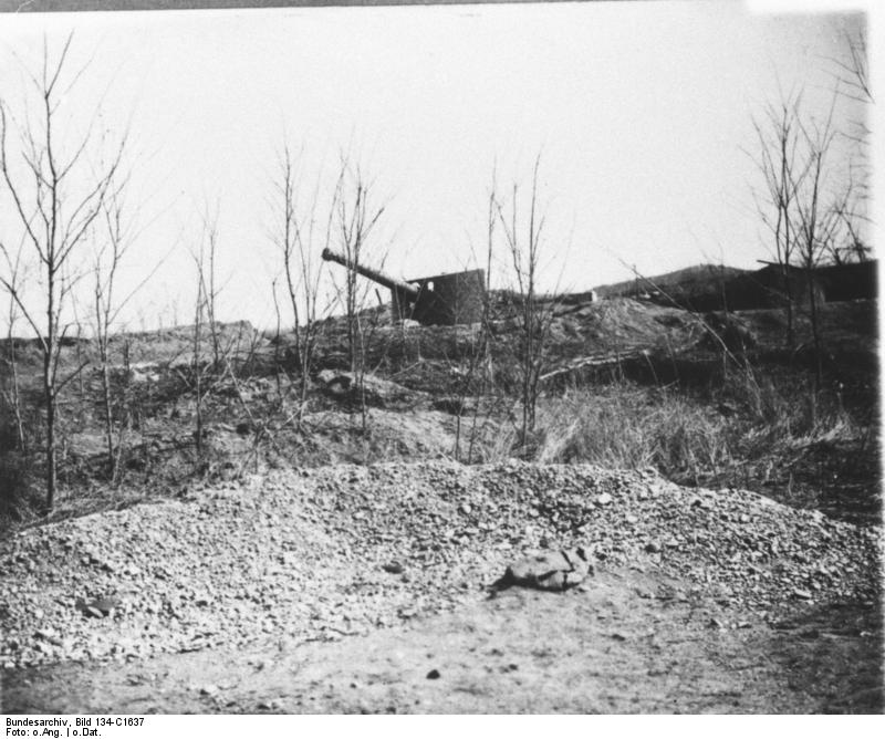 Schutzgebiet Kiautschou 1. Weltkrieg Zerschossenes Geschütz in deutscher Stellung